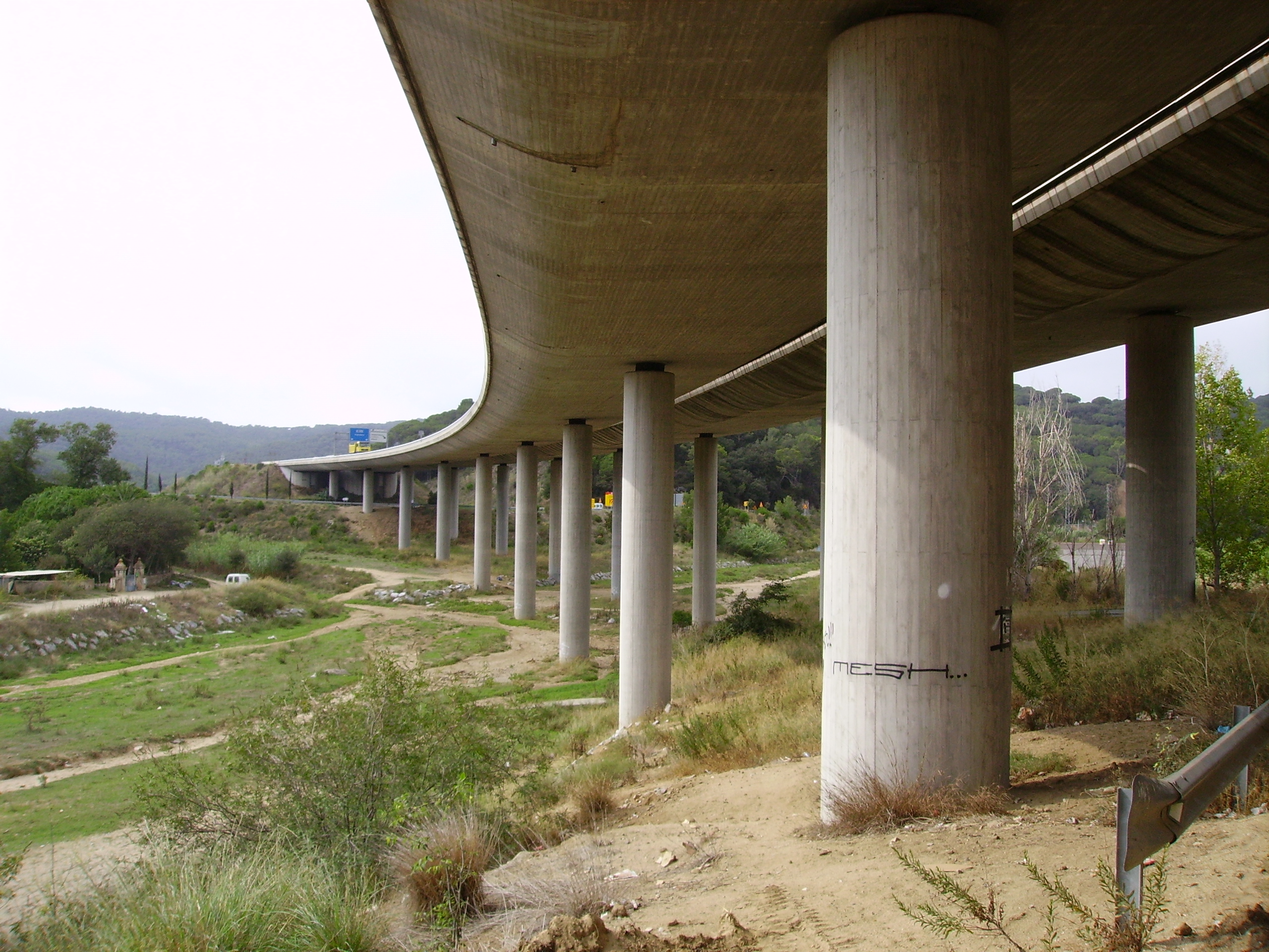 La C-60 sobre la Riera d'Argentona.